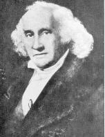 A painting of Steinheim, made before his death in 1866